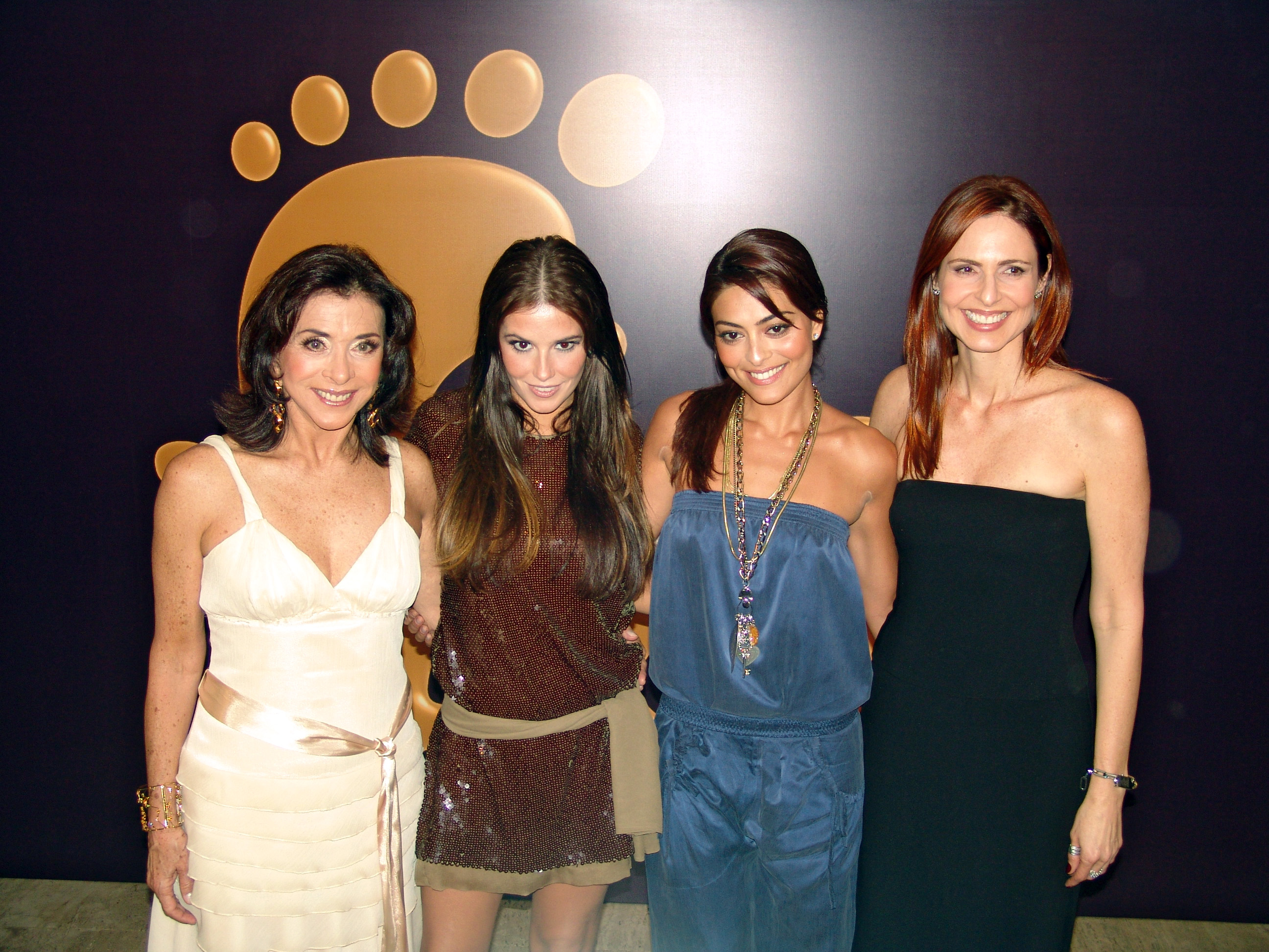 Betty Faria, Deborah Secco, Juliana Paes e Sílvia PfeiferPÉ NA JACA 00 (25)